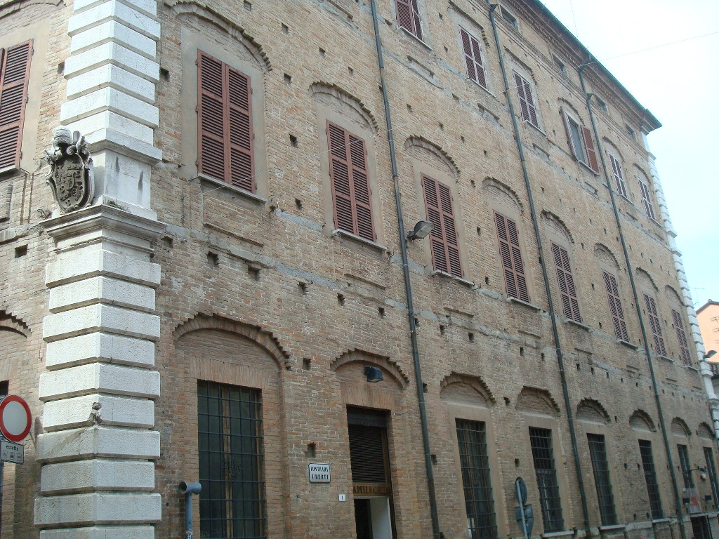 Cesena (Italie), façade latérale du Palazzo Ghini